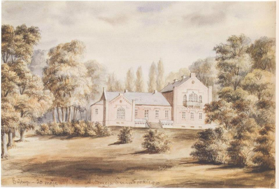 Беларуская (тарашкевіца): Болтуп (Bołtup), сядзіба Сьнядэцкіх (Śniadecki)